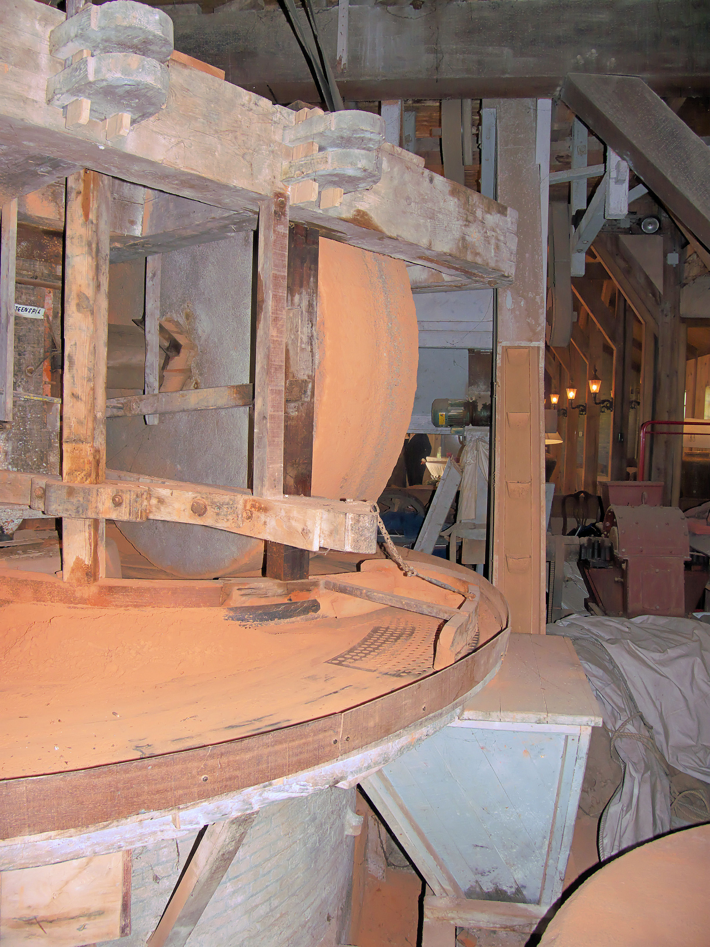 Krijtmolen d'Admiraal kantsteen en aanstrijker